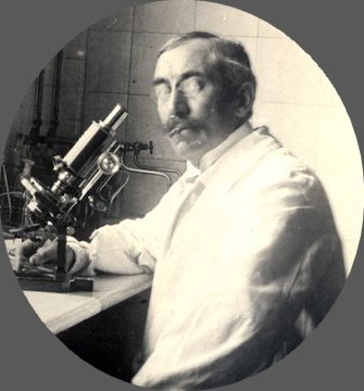 Henri Carré, 1870-1938, vétérinaire microbiologiste français, découvreur de l'étiologie virale de la maladie qui porte son nom